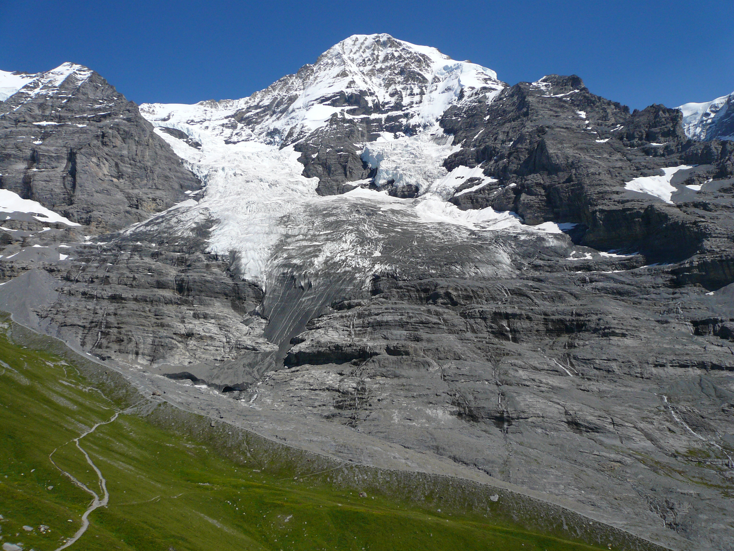 Eigergletscher